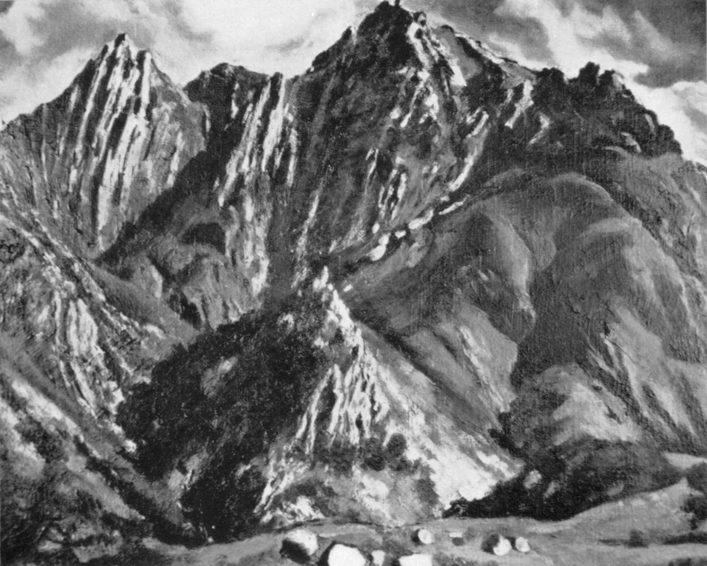 "Kalifornische Bergimpression", Gemälde von Max Schoop.